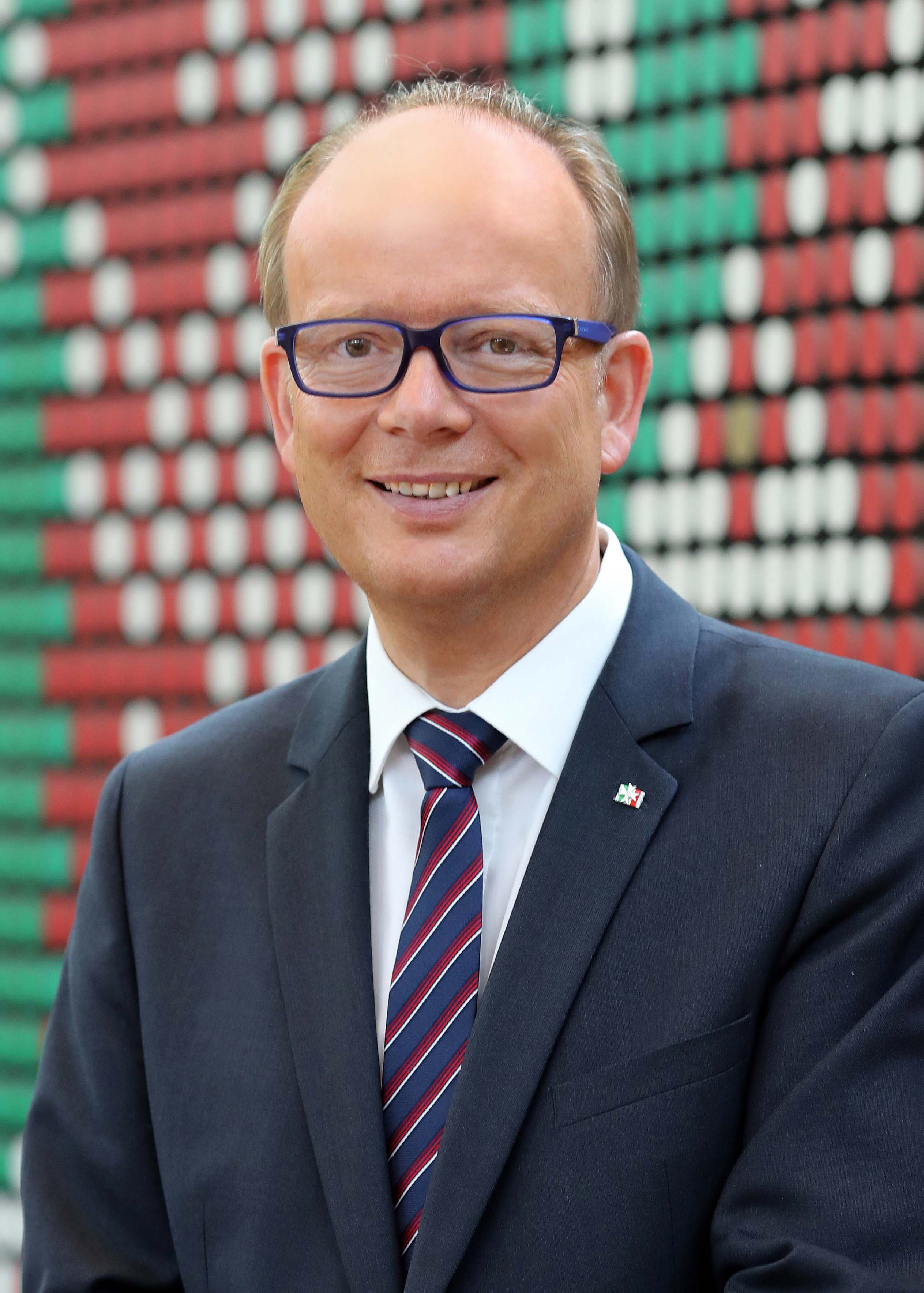 André Kuper, Präsident des Landtags Nordrhein-Westfalen